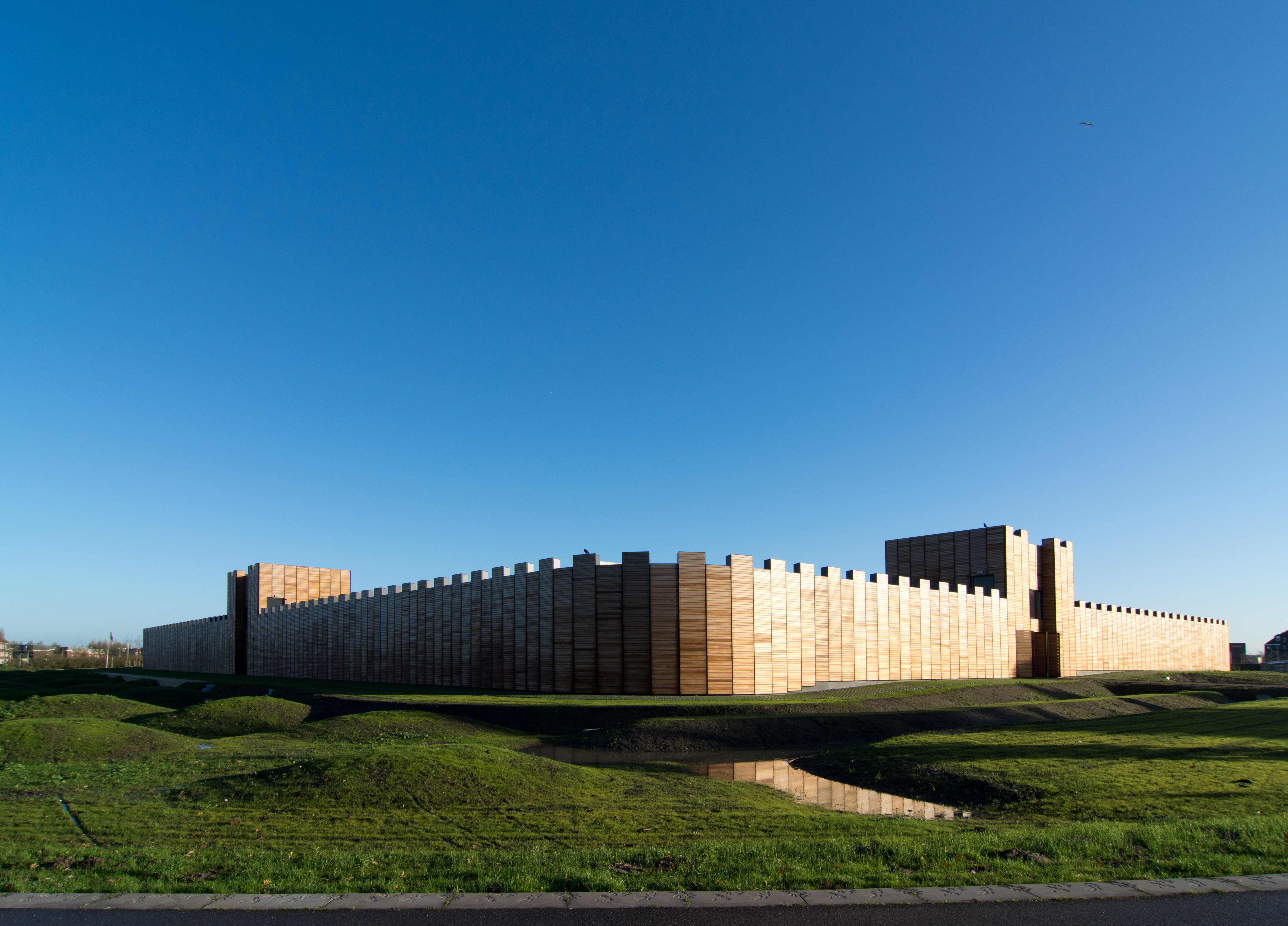 Op de vindplaats is een Romeins castellum nagebouwd. Daarin bevindt zich ook een Romeins schip dat in de wijk Veldhuizen in De Meern is gevonden.